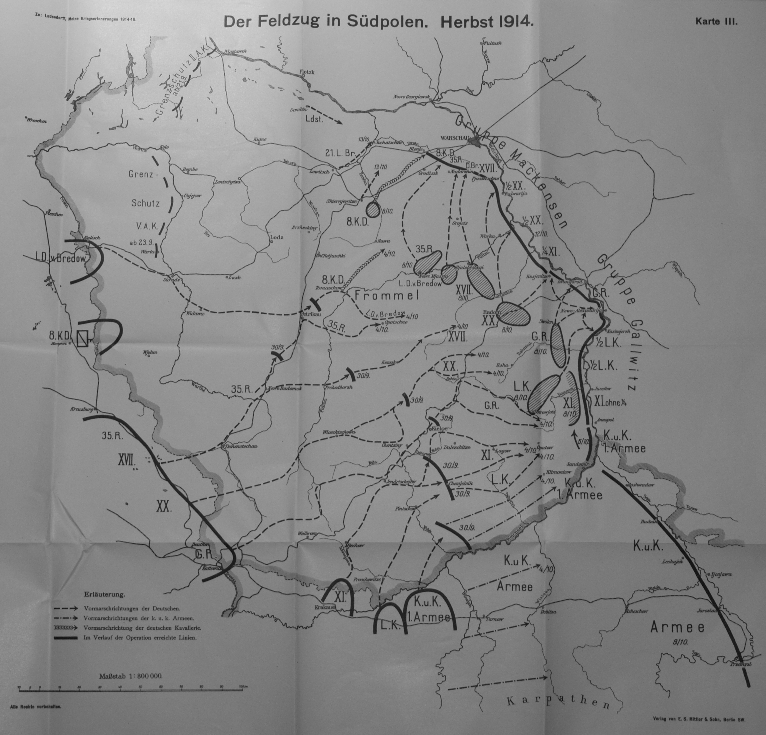 Foto "Meine Kriegserinnerungen" 1914 - 1918